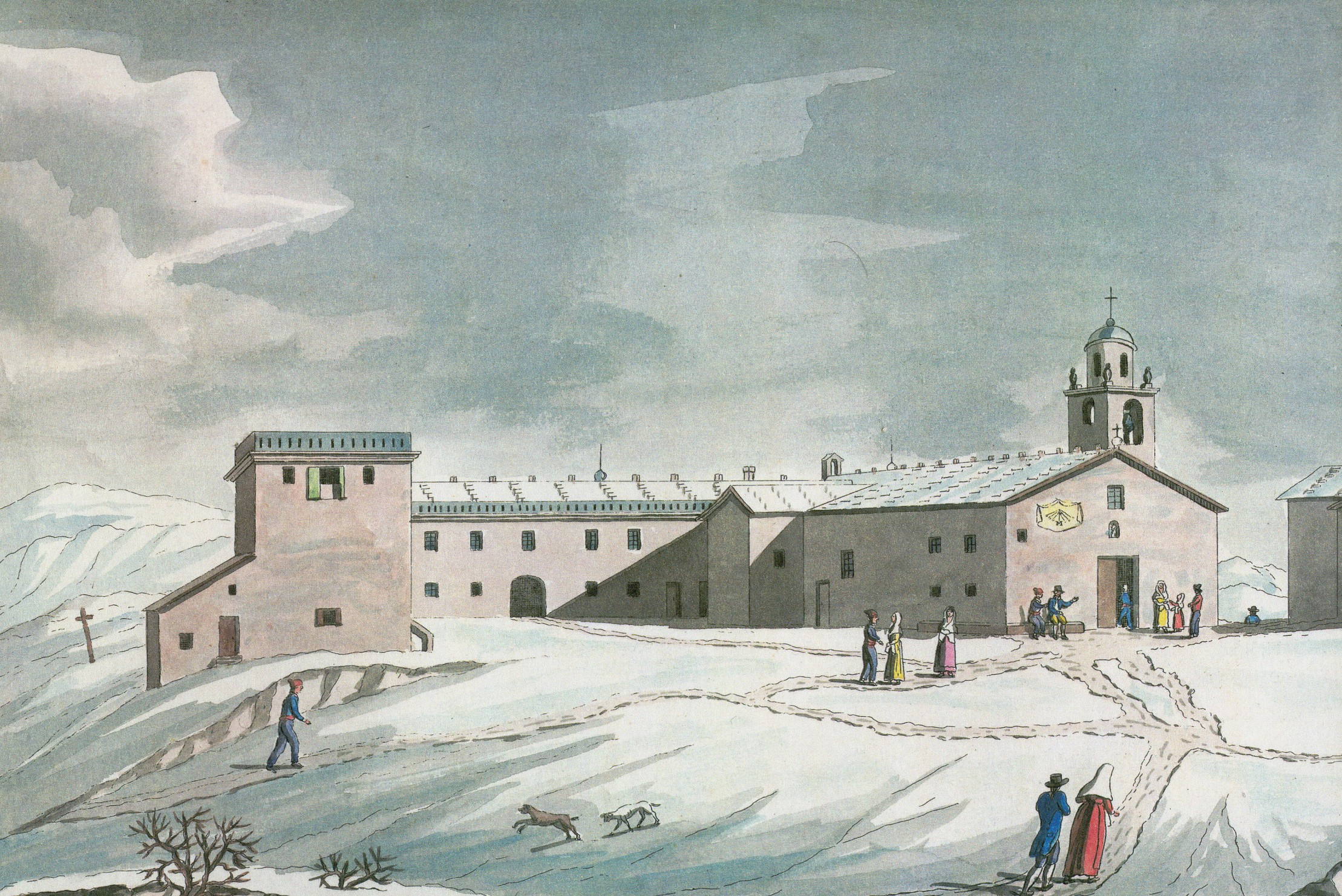 Santuario di Nostra Signora della Guardia, a Ceranesi (Genova) - acquatinta, 1820